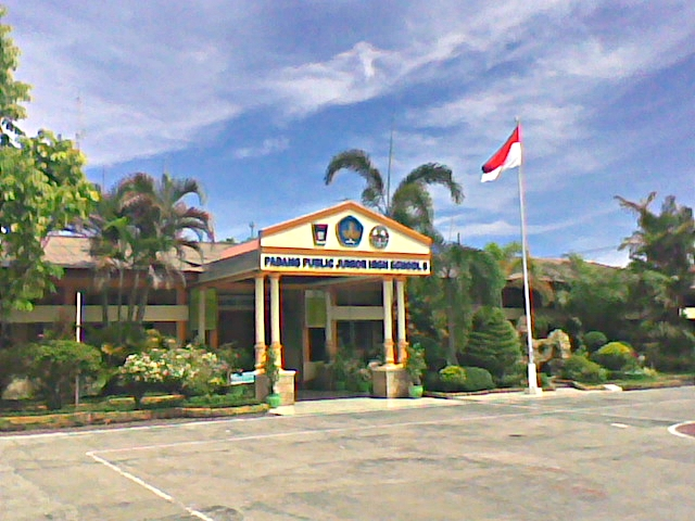 SMPN 8 Padang, sebuah SMP negeri ternama di Kota Padang.